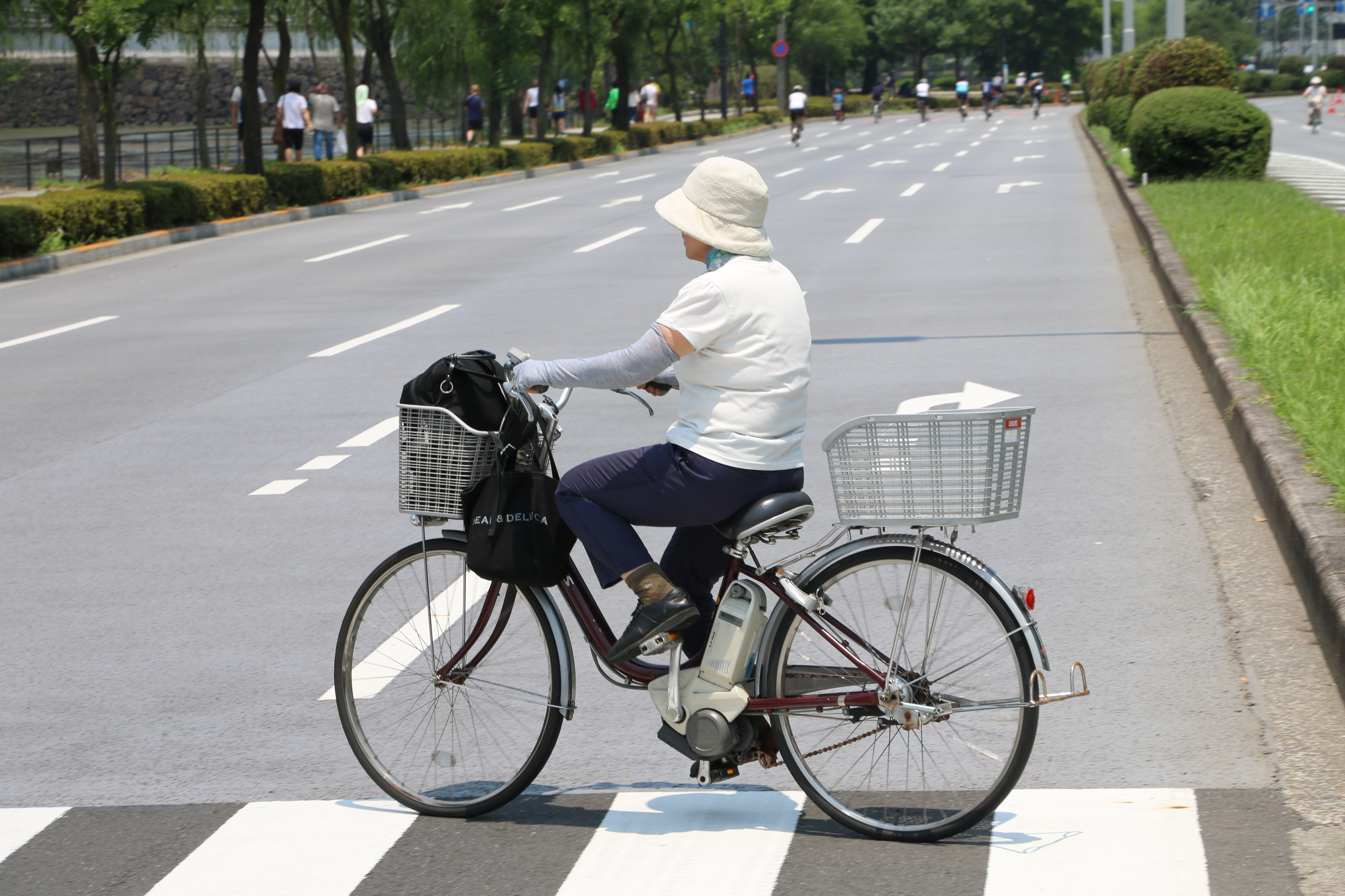 ELECTRIC BIKE IN TOKYO